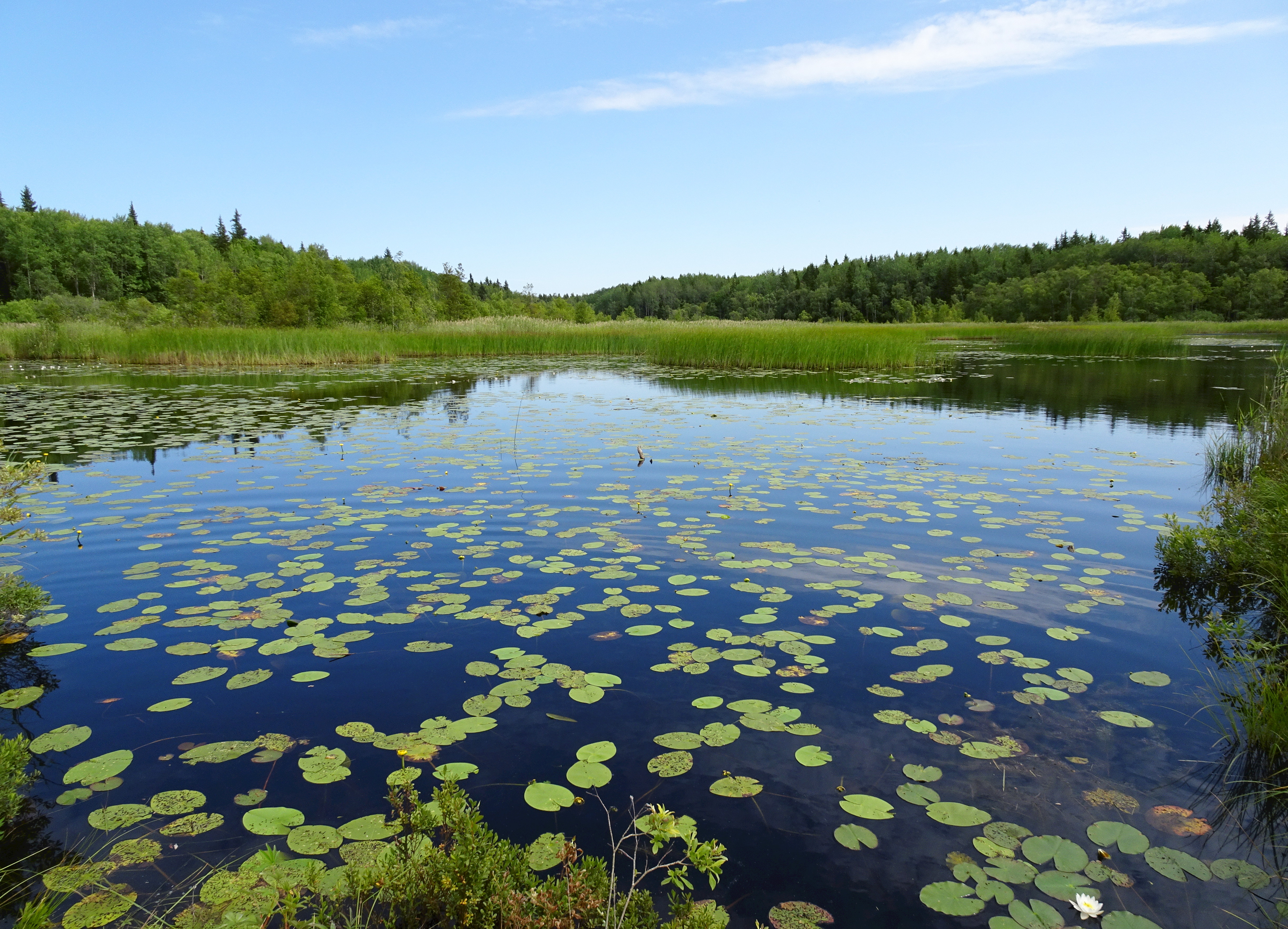 Måsjön, Väddö socken